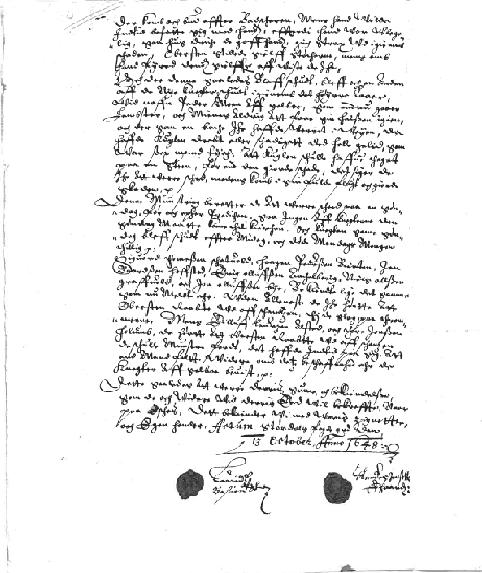 Del av et rettsdokument fra 1648 i forbindelse med drap begått av oberst Benedict Kress på Skånes skanse i Levanger.